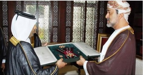 جائزة السلطان قابوس